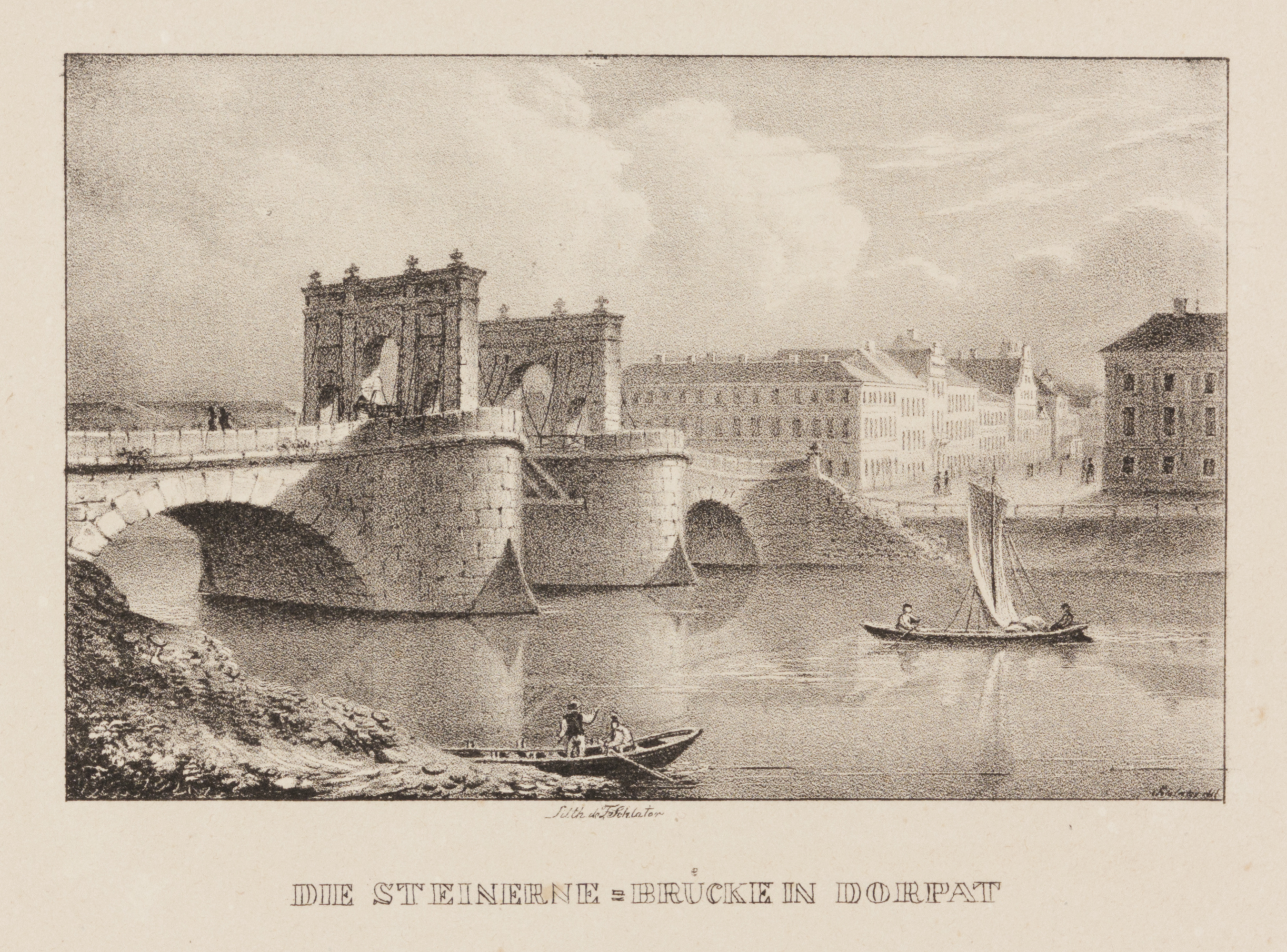 "Tartu Kivisild" (u 1832–1835). Litograafia. Kujutise kõrgus 8,6 ja laius 13,5 cm, lehe kõrgus 18,3 ja laius 27,7 cm. This image on crowdsourcing geotagging platform Ajapaik MUIS:TKM TR 4017 G 1247